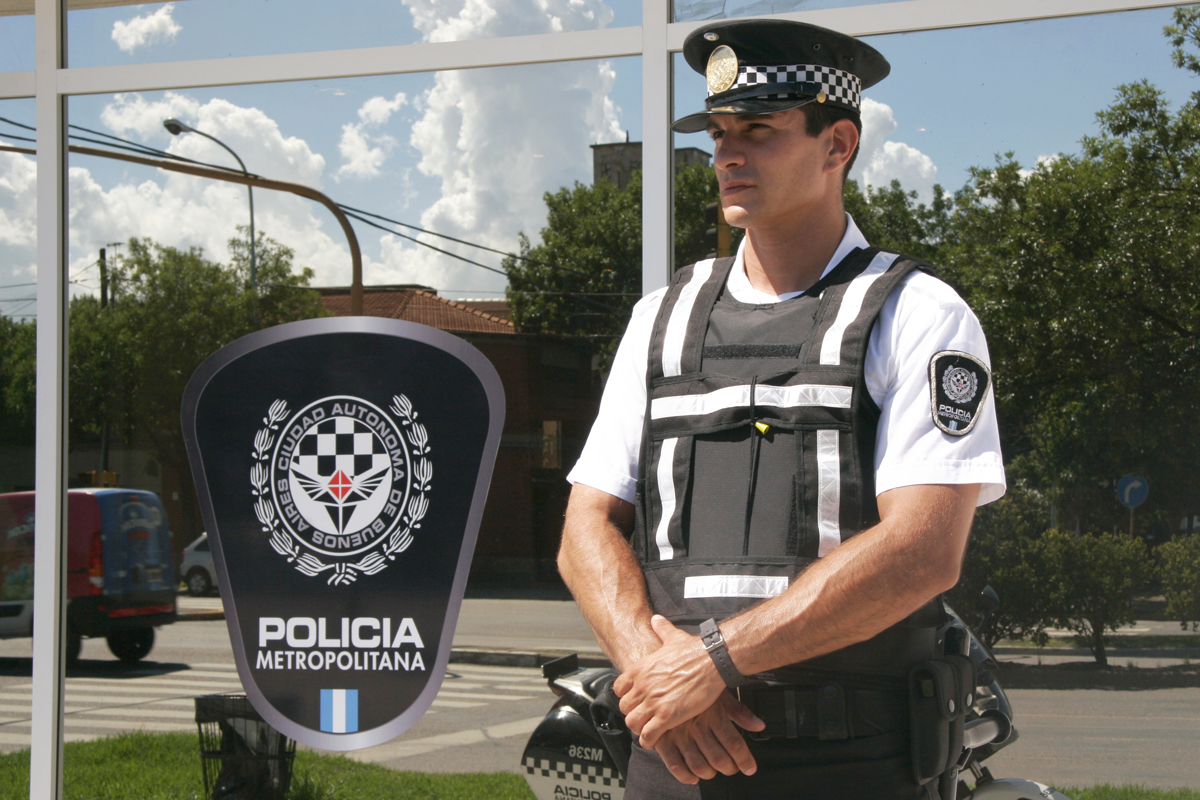 Personal de la Policia Metropolitana en la Comuna 12, Saavedra, Ciudad de Buenos Aires.